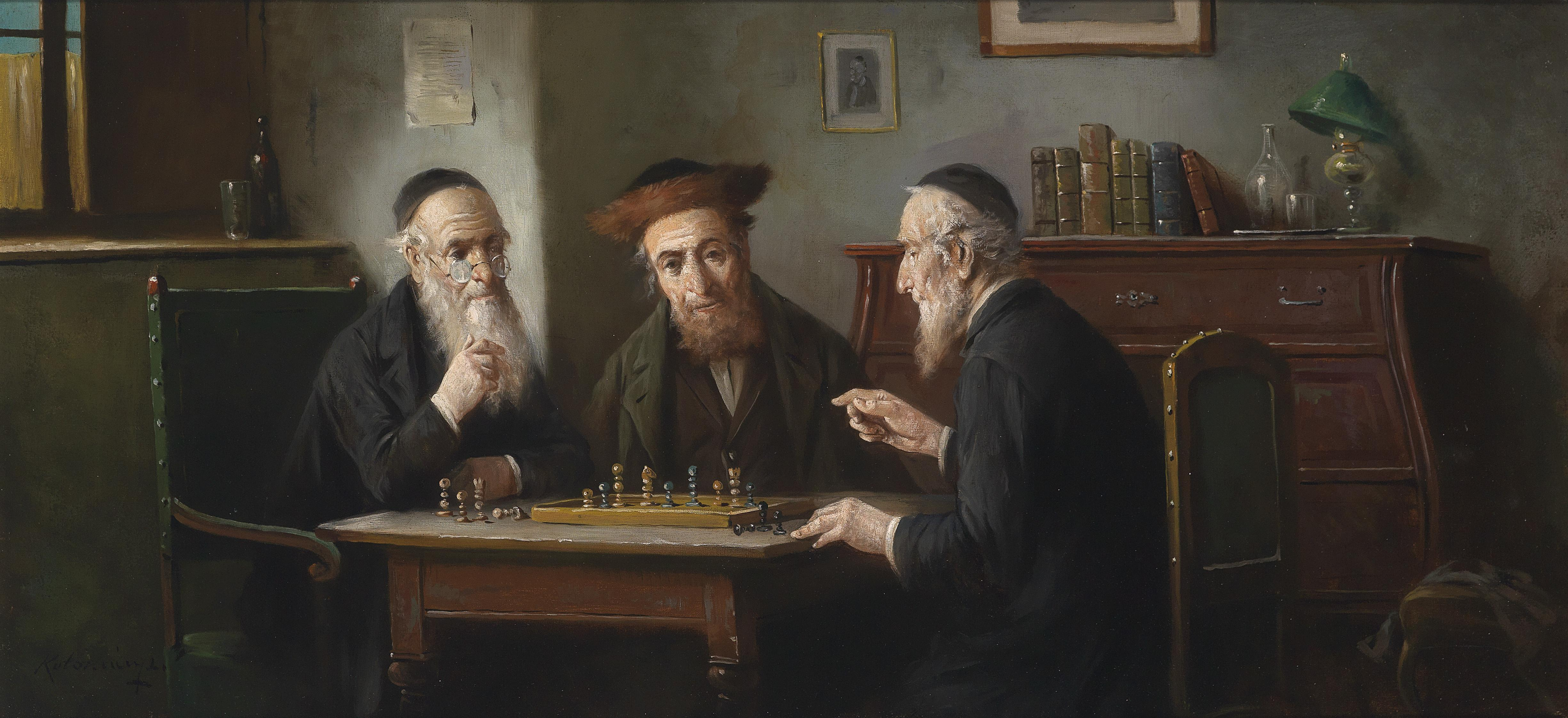 Das Schachspiel, signiert Kolozsvary L, Öl auf Leinwand, 48 x 102 cm